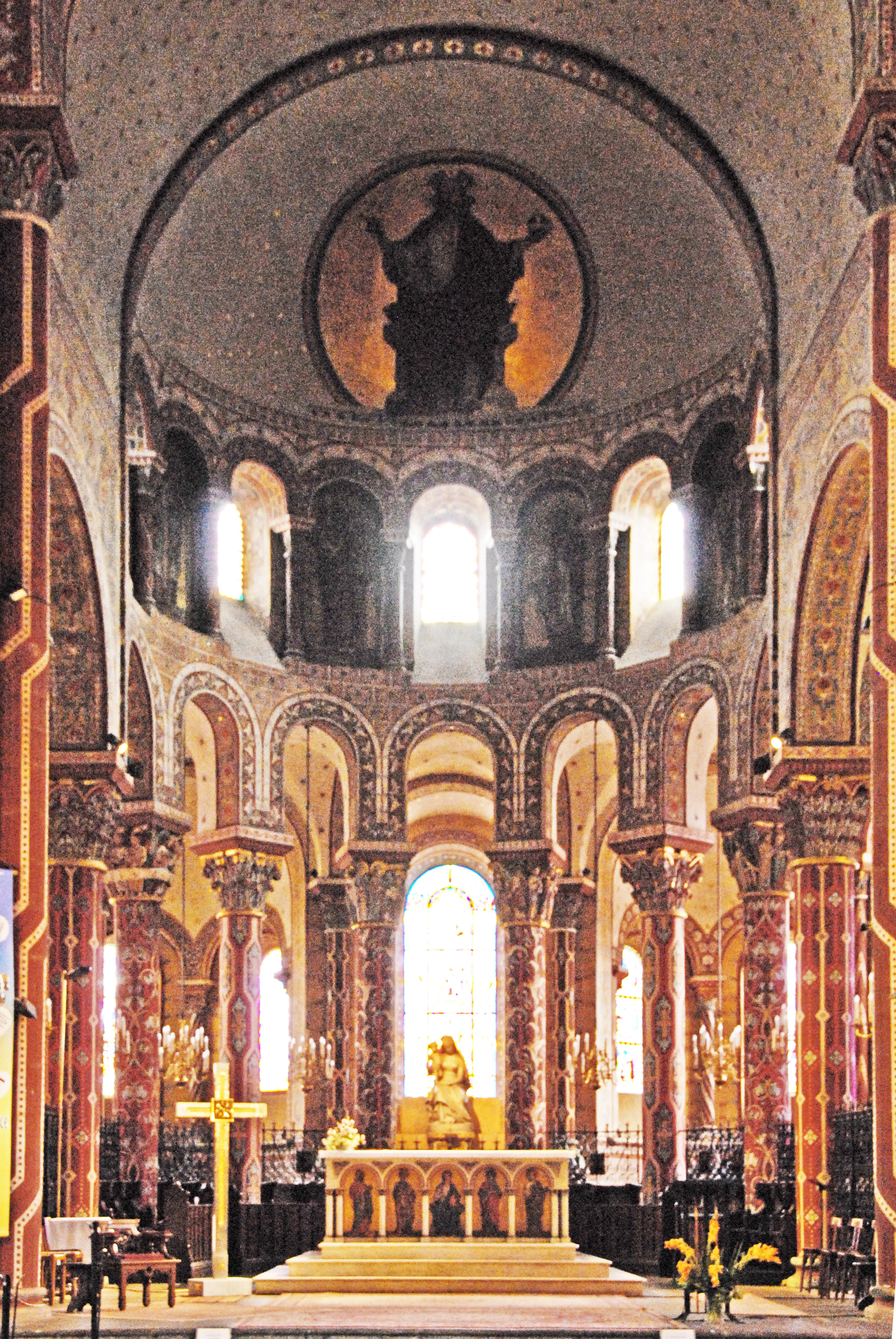 Chor